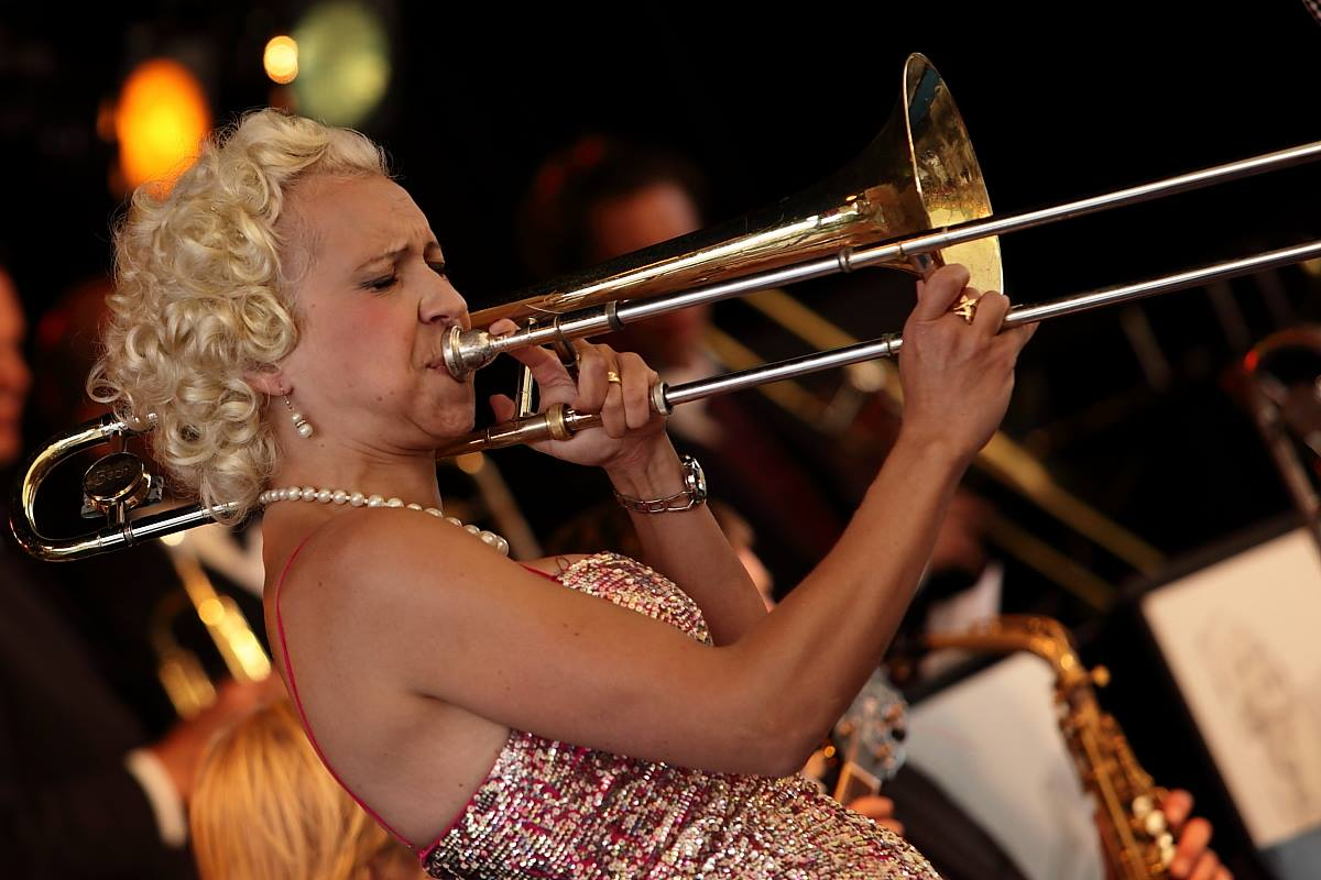 Jazzmusikern Gunhild Carling.